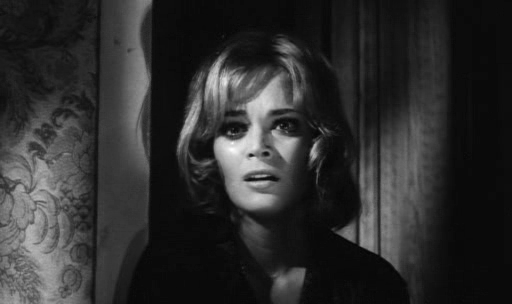 Screenshot del film La ragazza che sapeva troppo (1963) di Mario Bava.